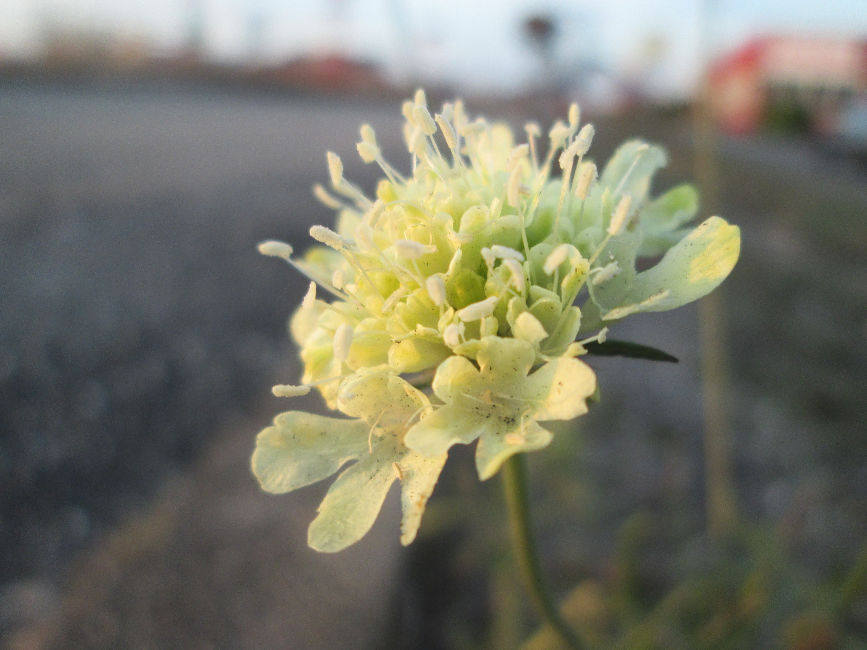 Gelbe Skabiose (Scabiosa ochroleuca) wild wachsend am Straßenrand im Industriegebiet Hockenheim-Talhaus